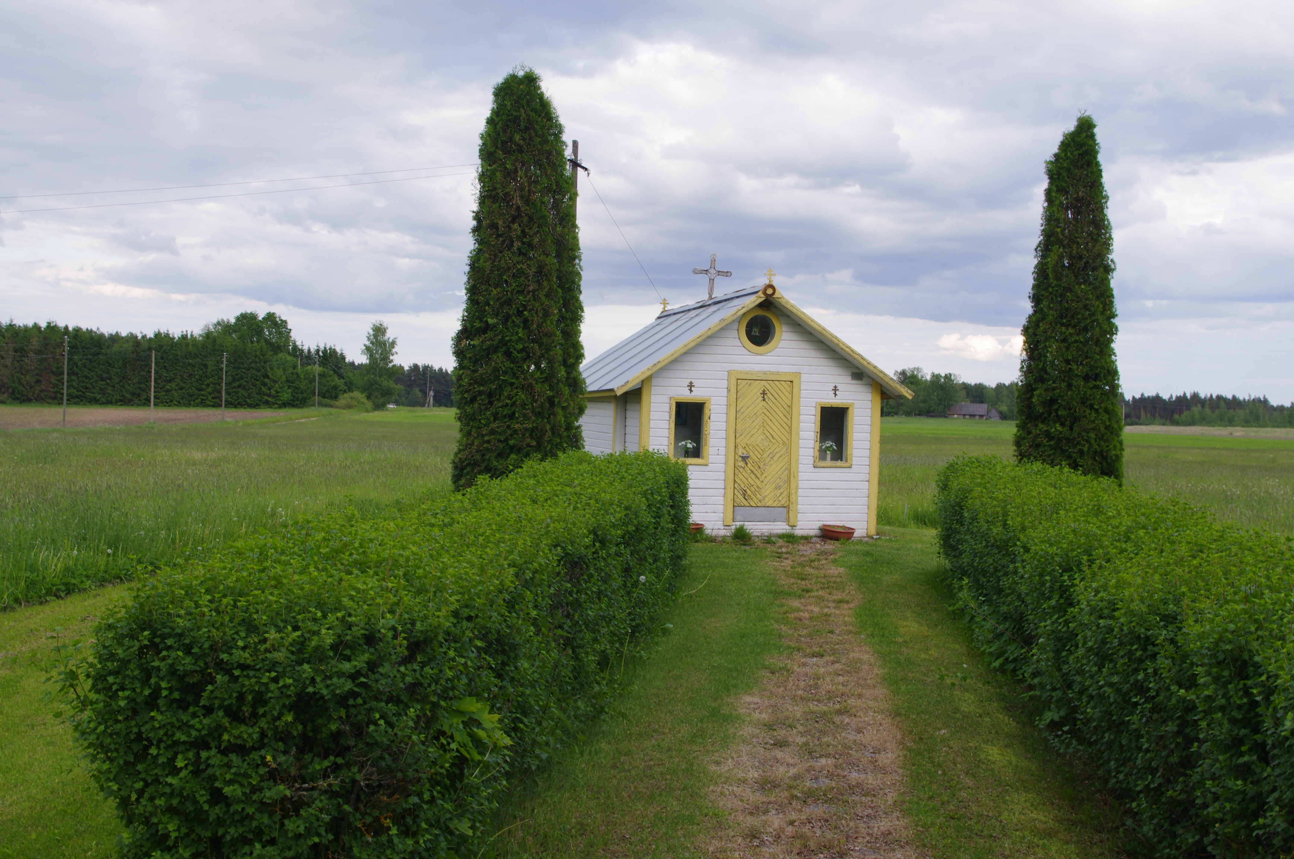 Tsässon